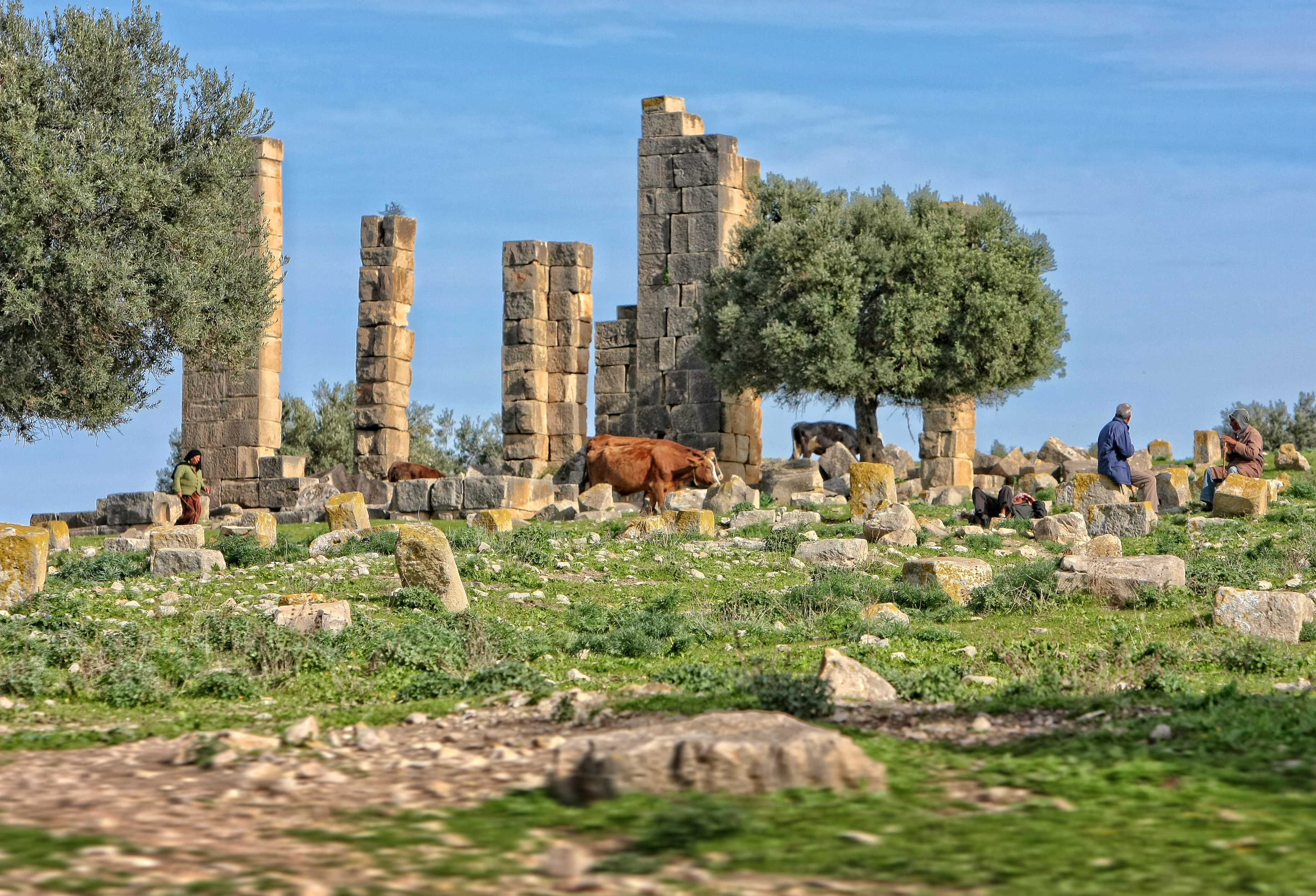 Grand temple, dans le haut de la ville (peut-être un temple de Mercure construit en 169)